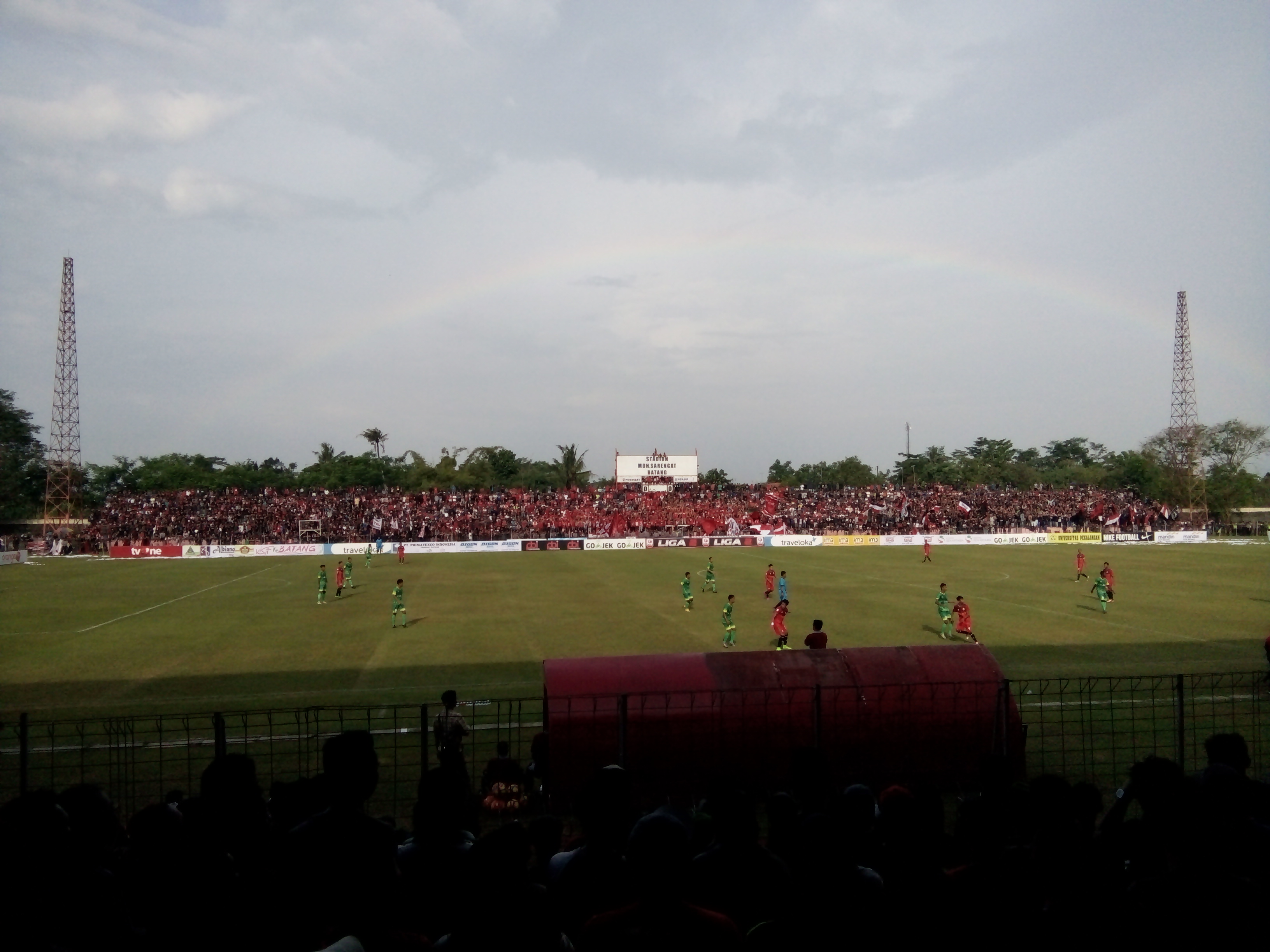 Salah satu pertandingan home Persibat Batang di ISC B 2016